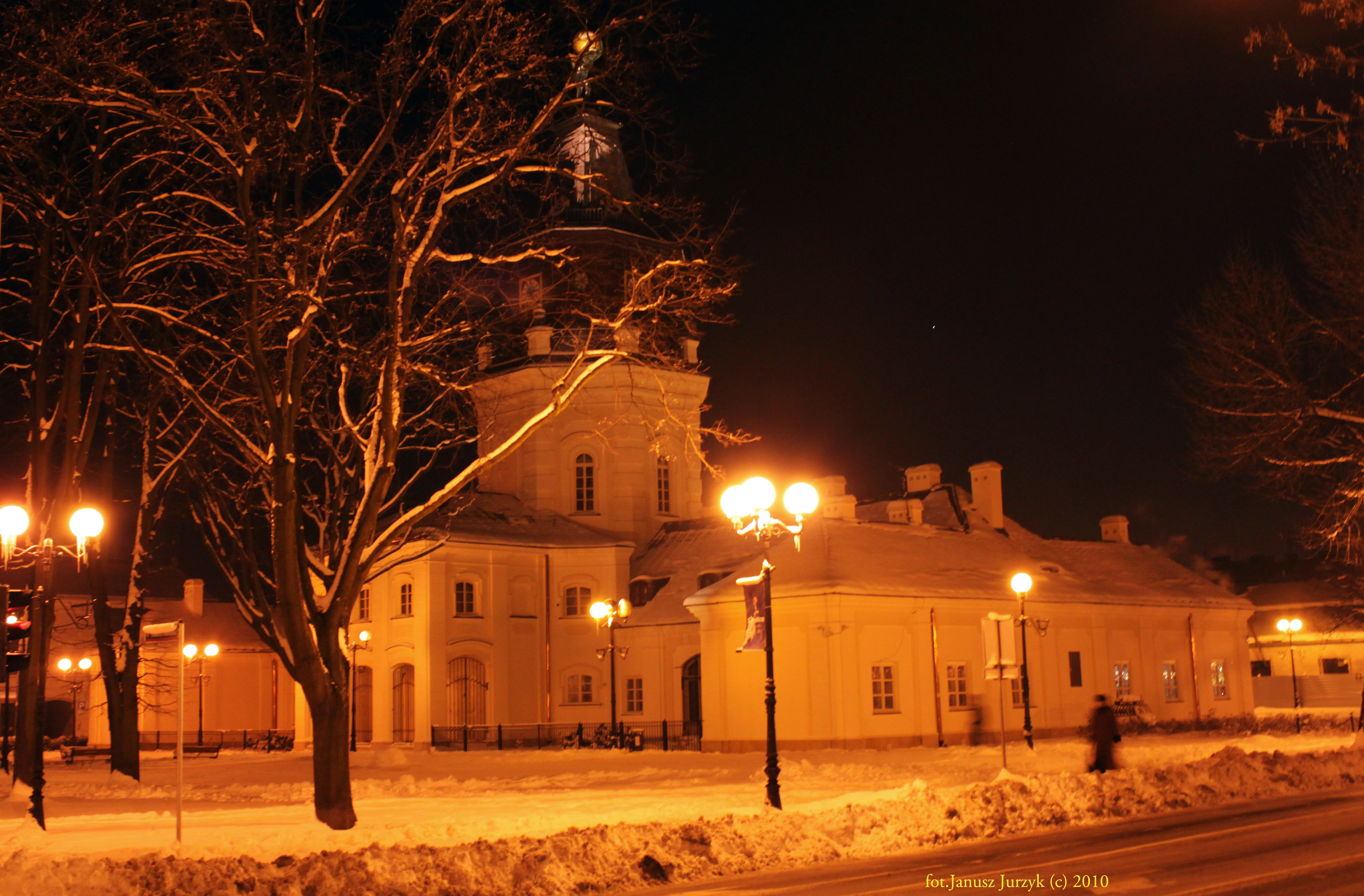 Ratusz Miejski w Siedlcach.